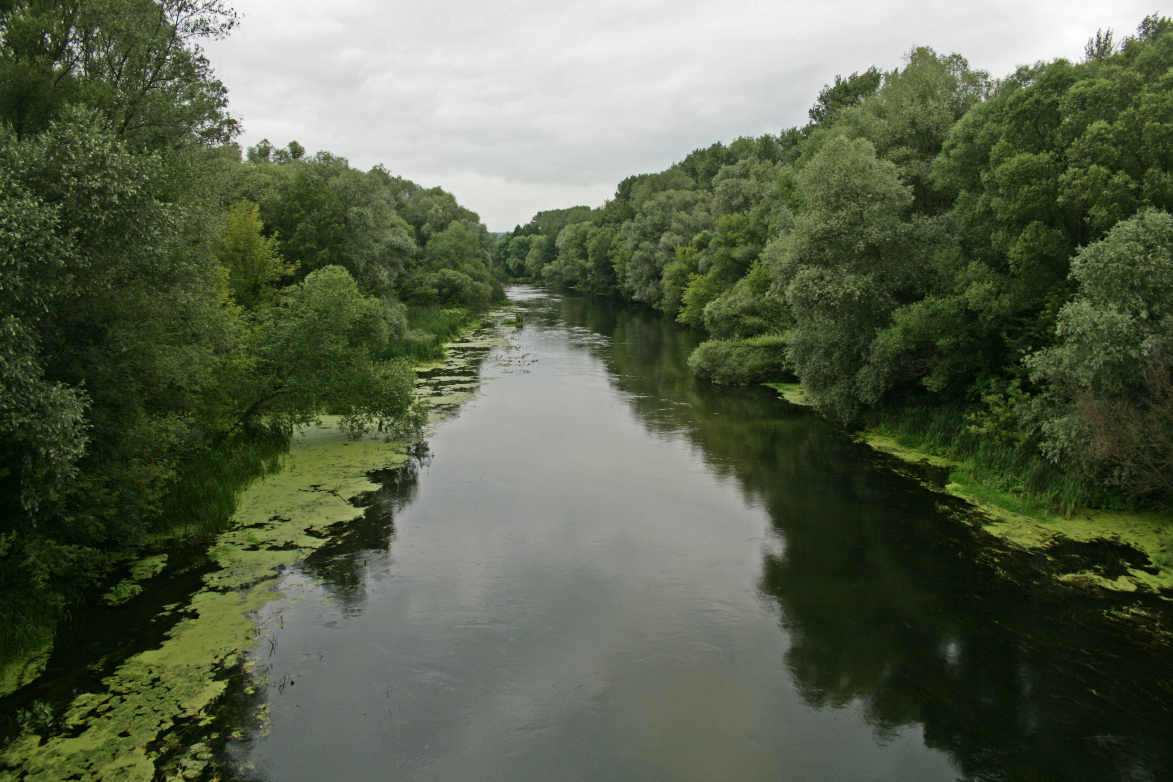 Река Оскол. Волоконовский район Белгородской области, с. Афоньевка.